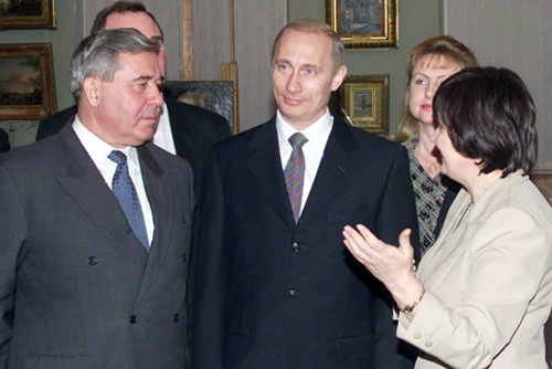 ОМСК. С губернатором Омской области Леонидом Полежаевым (слева) во время осмотра экспозиции Омского музея изобразительных искусств имени Врубеля.